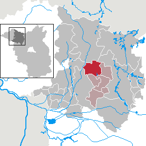 Temnitzquell in Brandenburg (Country) - District Ostprignitz-Ruppin